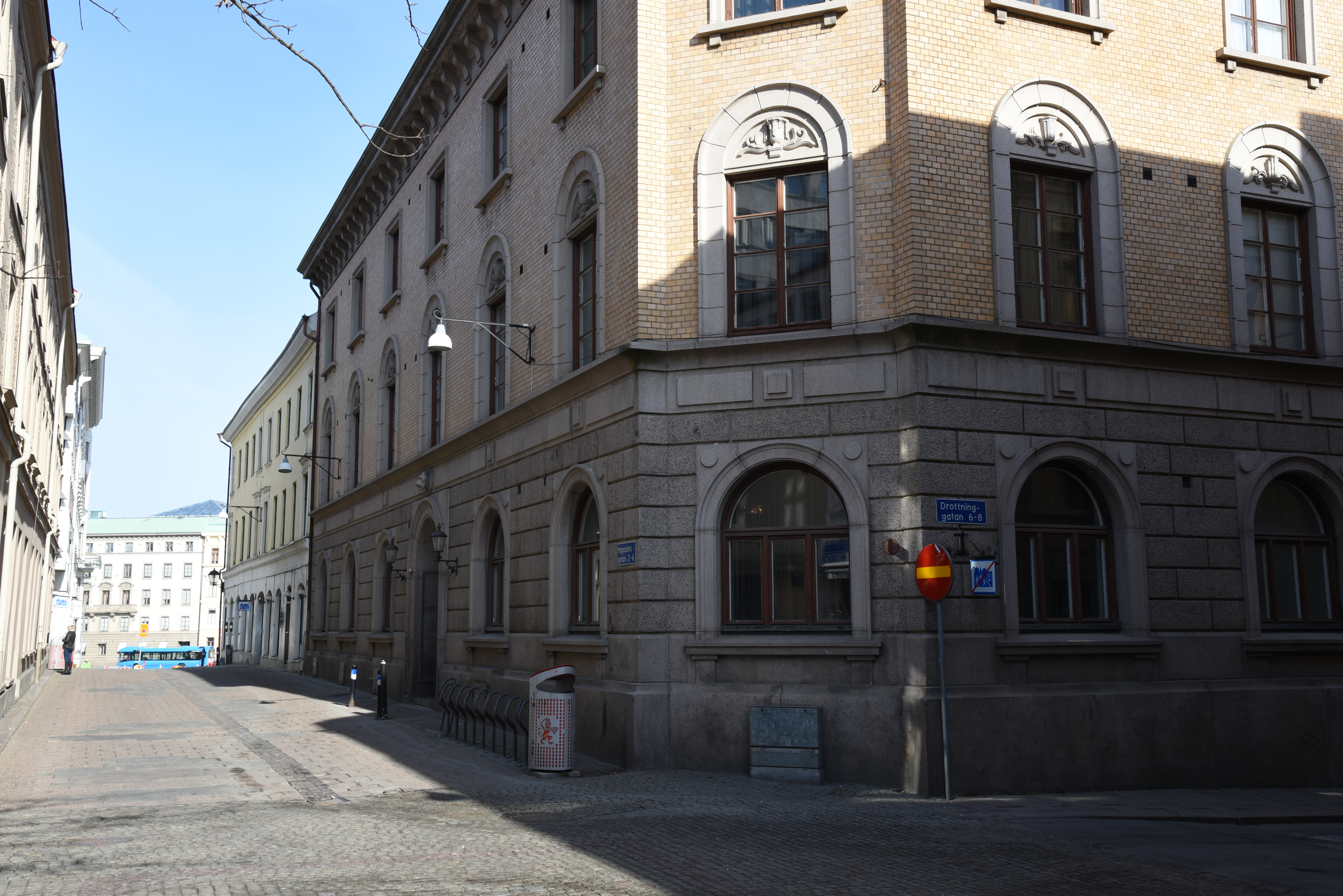 Sveahuset vid Magasinsgatan 6–Drottninggatan 6 i kvarteret Alströmer i stadsdelen Inom Vallgraven i Göteborg. Byggnaden uppfördes för Brand- och lifförsäkrings AB Svea.